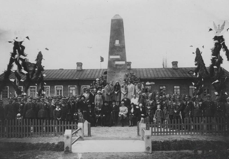 Беларуская (тарашкевіца): Групавы фатаздымак жаўнераў 20-га палку палявой артылерыі і жыхароў перад помнікам Рамуальду Траўгуту ў Пружане падчас ягонага адкрыцьця